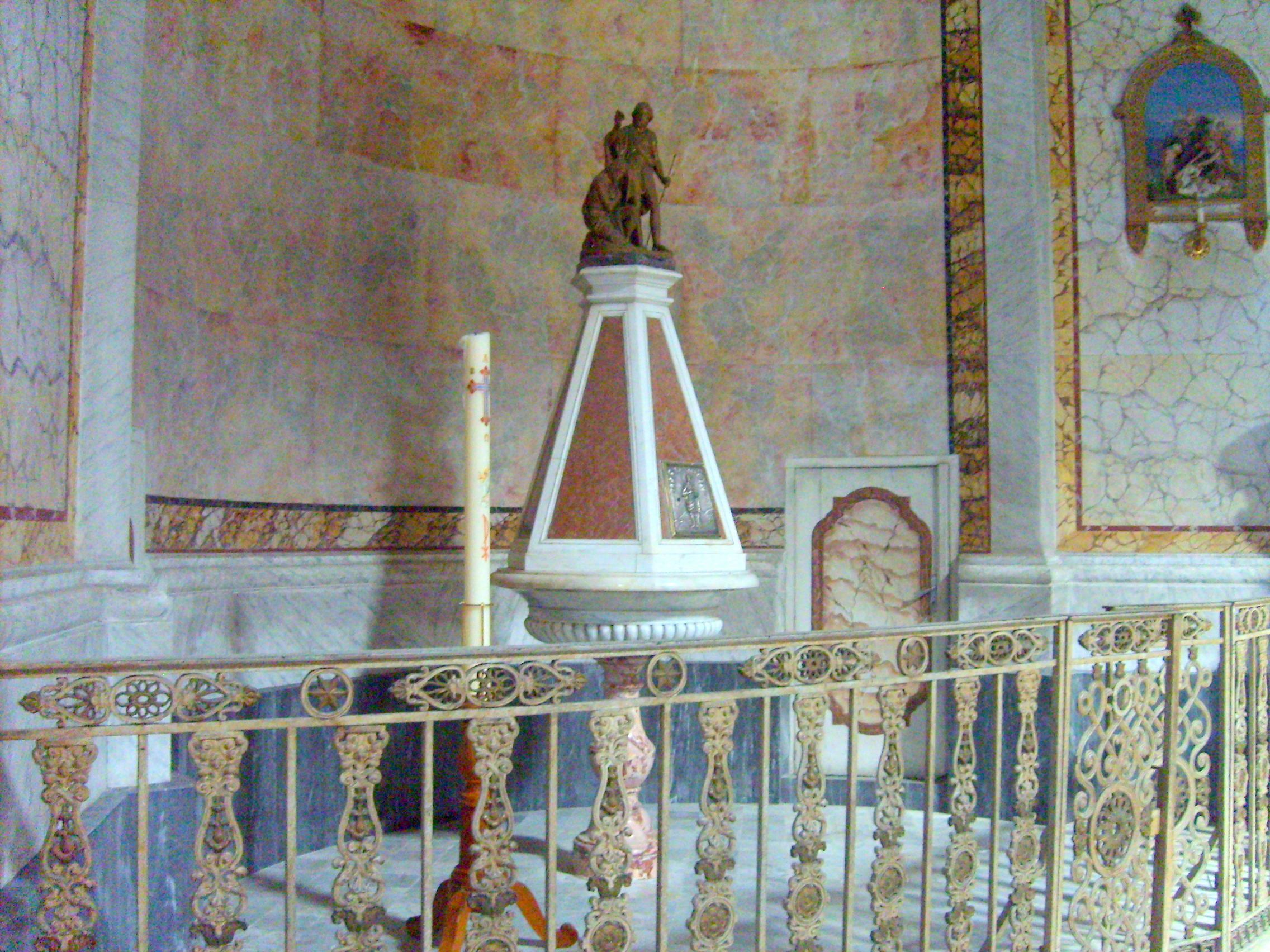 Fonte battesimale della chiesa matrice